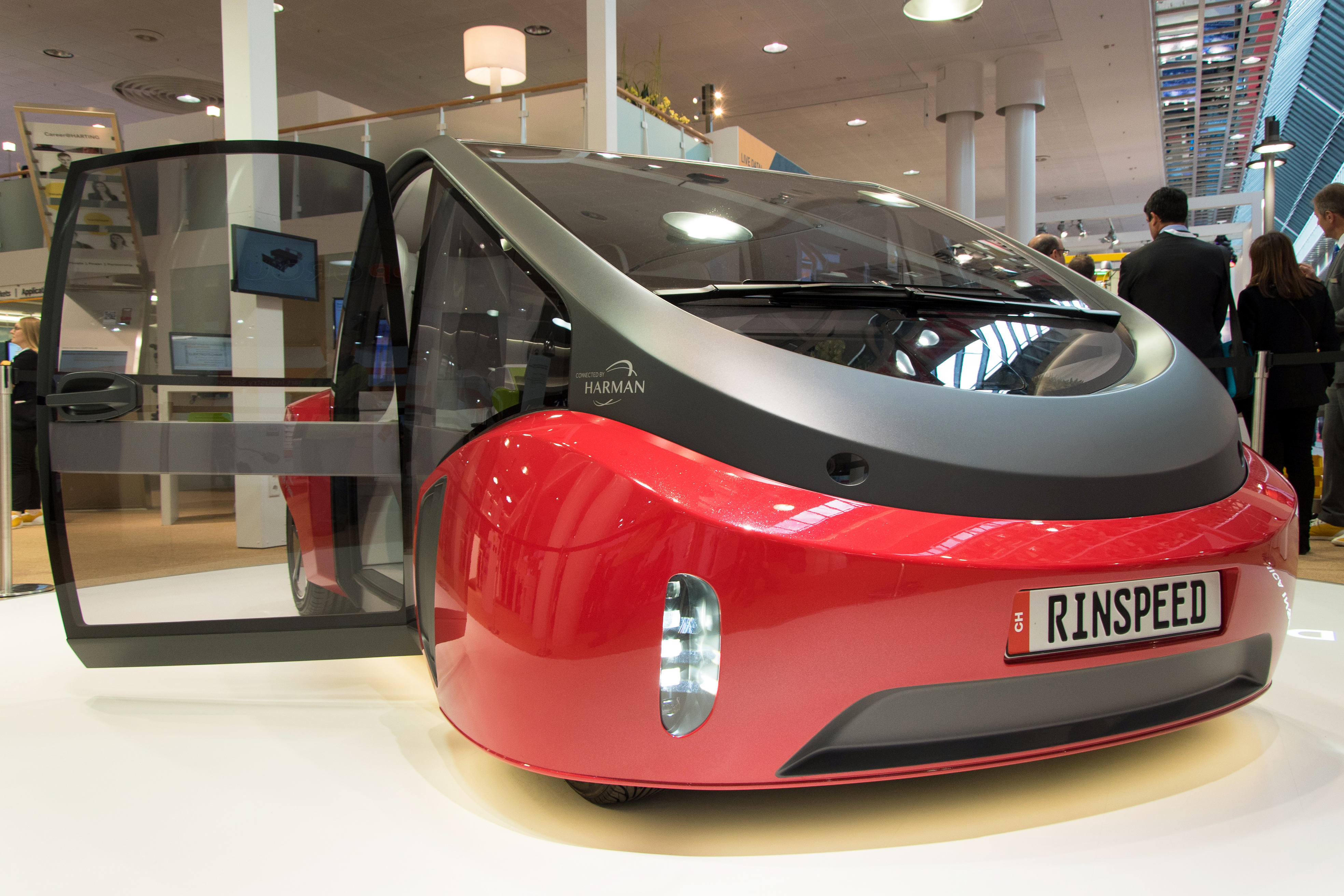 Rinspeed Oasis auf der Hannover-Messe 2017